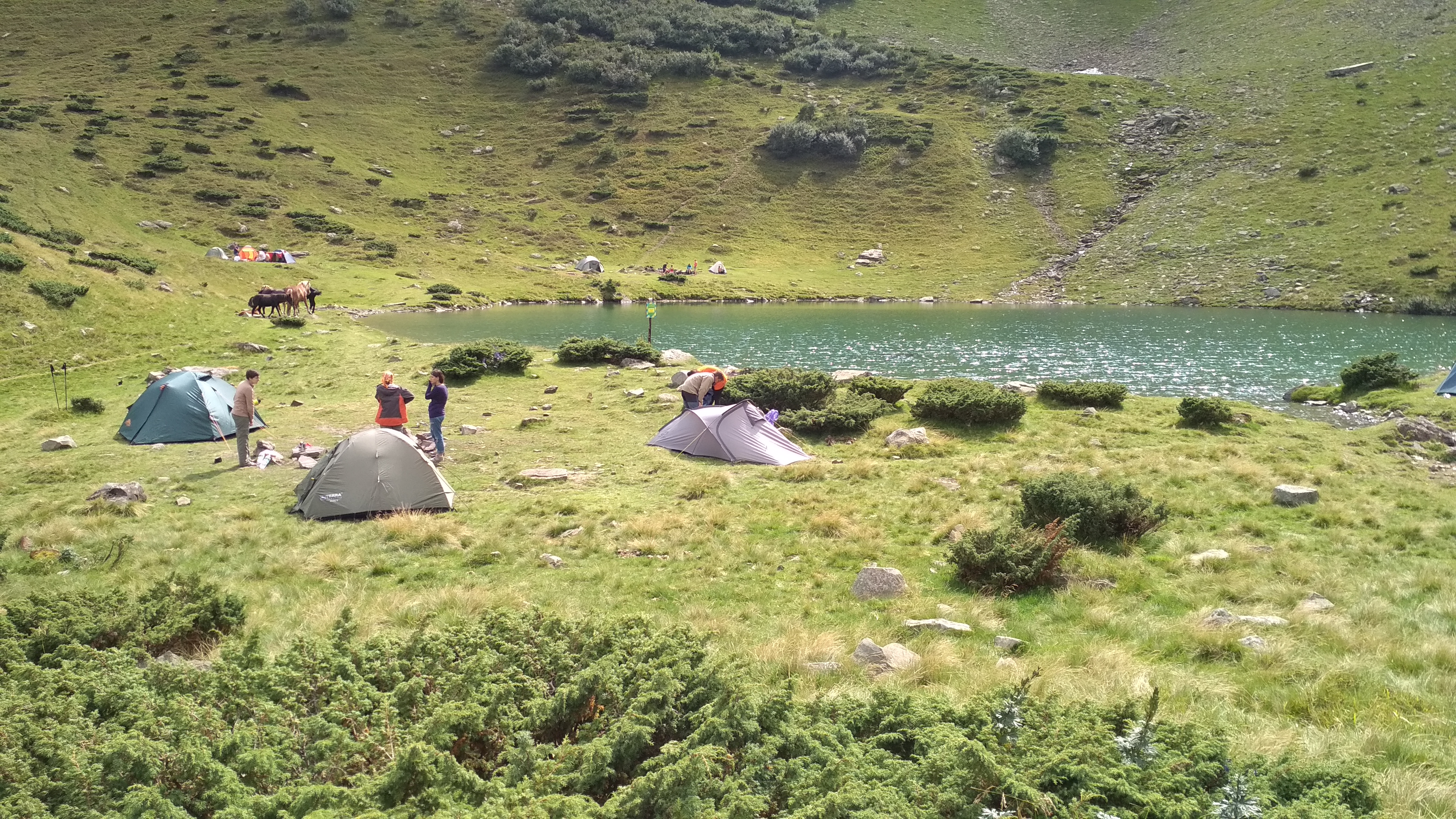 Вид на озеро з охорзнаком